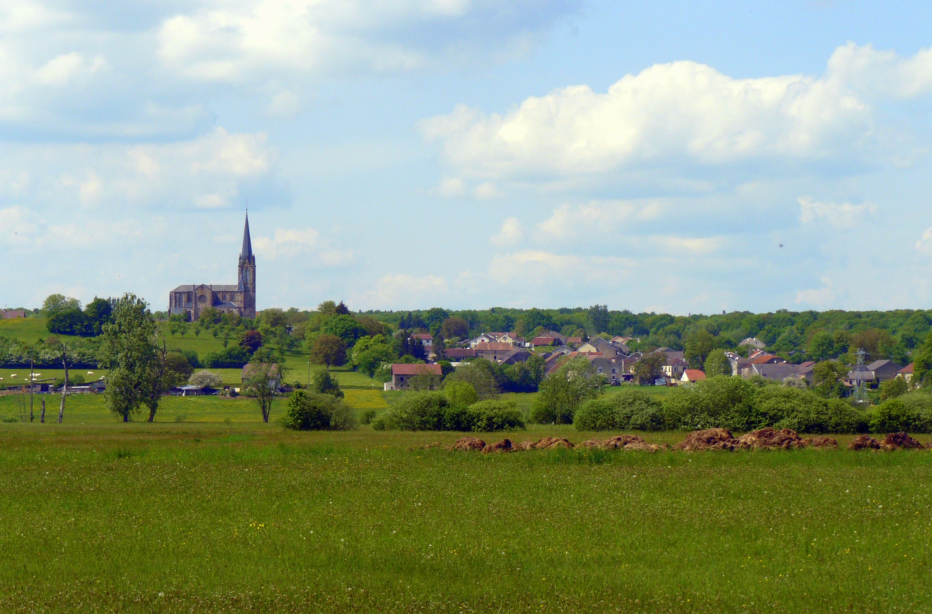 Vue du village de Hautevelle (Haute-Saône, France)